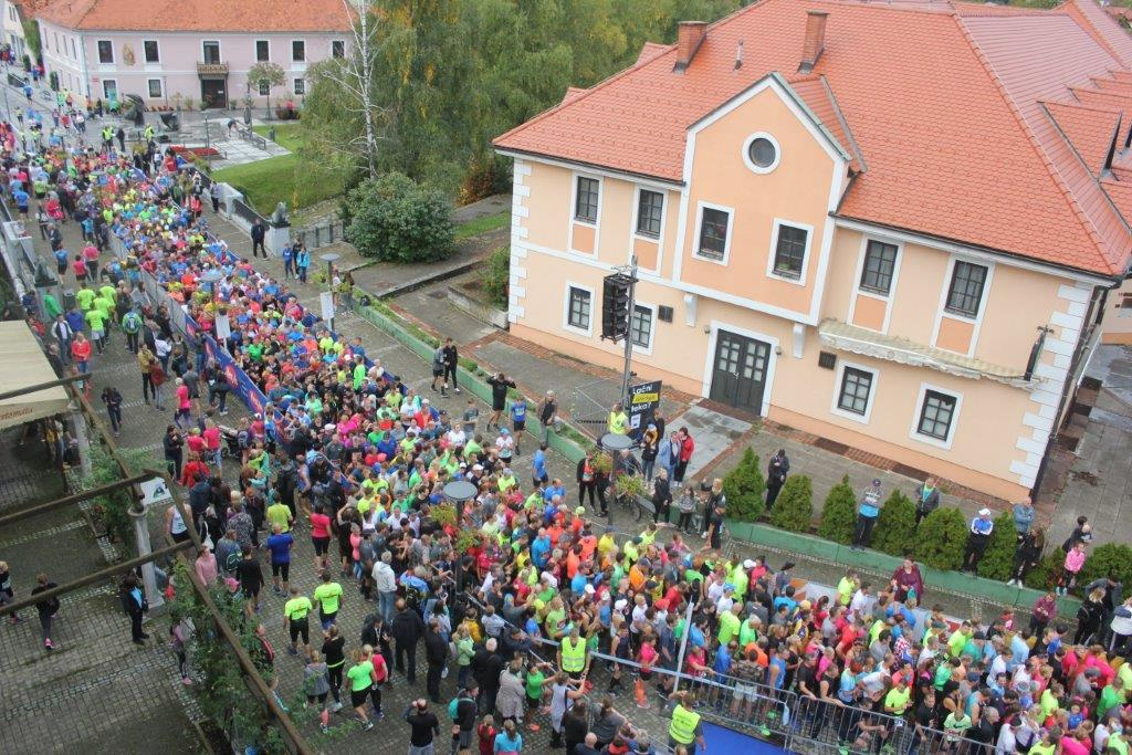 Konjiski maraton 2019 4